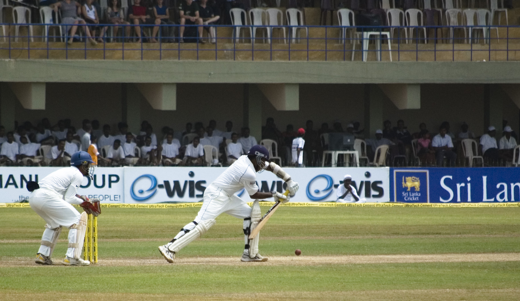 Mahela Jayawardana